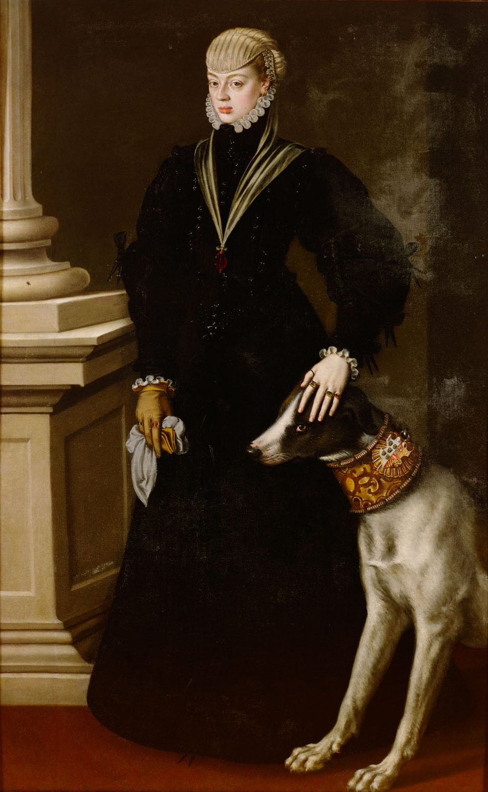 Dona Juana (1535-1573), Prinzessin von Portugal, ganzfiguriges Bildnis im Alter von 22 Jahren mit einer Dogge